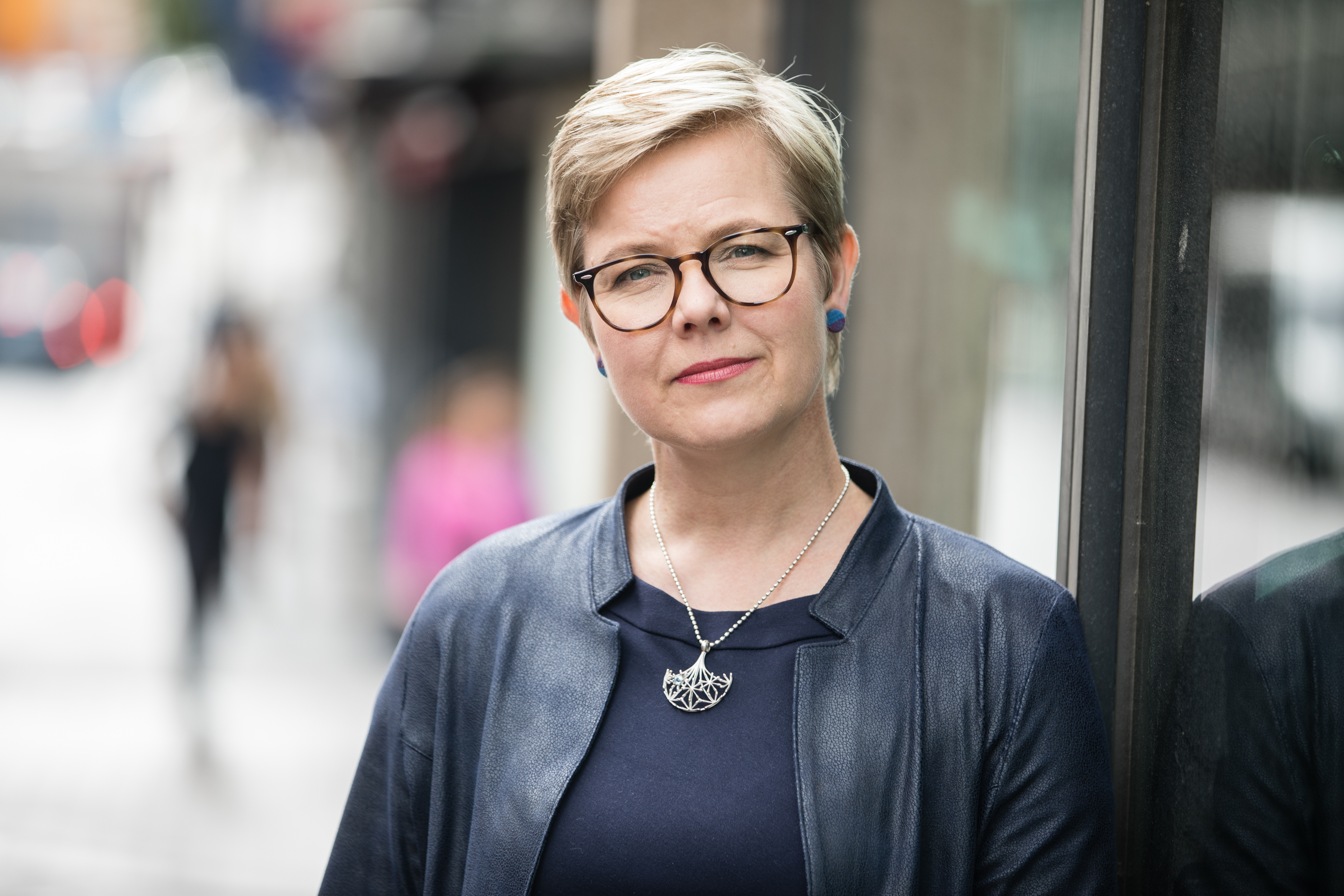 Ympäristö- ja ilmastoministeri Krista Mikkonen virallisessa valokuvassa. Kuva Valtioneuvoston kuvapankista.